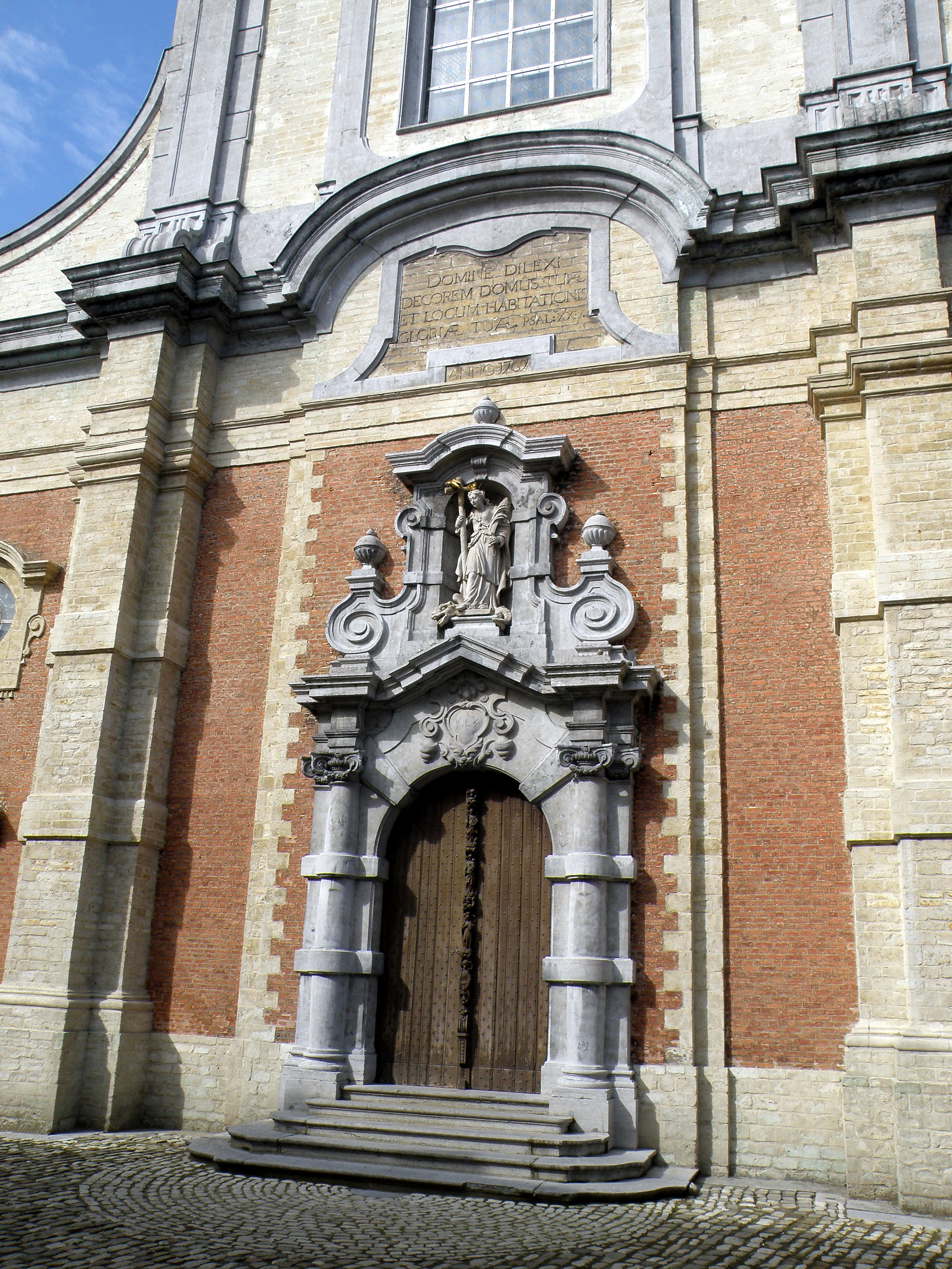 Lierre (en néerl. Lier), ville de Flandre (Belgique), située à une quinzaine de km. au sud-est d’Anvers. Église du béguinage, placée sous le vocable de Sainte-Marguerite (néerl. Sint-Margarethakerk), de style baroque, construite entre 1664 et 1665, d’après les plans des arch. L. Kest en J. De Winter ; clocheton d'Engelbert Baets. Gros plan sur la travée centrale de la façade orientale (le chœur est tourné vers l’ouest), avec portail d'entrée, sommé d'une niche abritant une statue de sainte Marguerite, œuvre du sculpteur M. J. d'Heur.